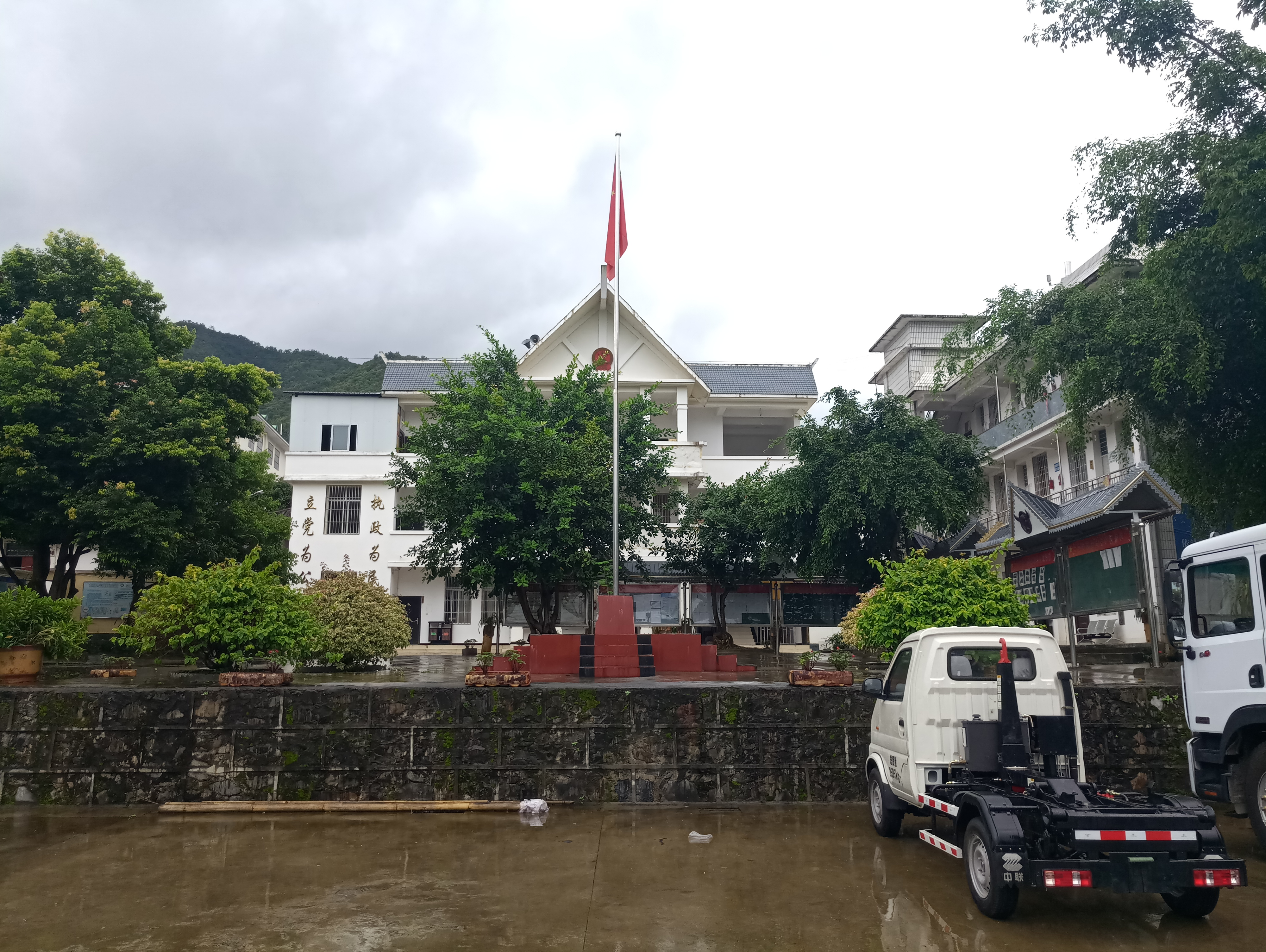 芒海镇政府